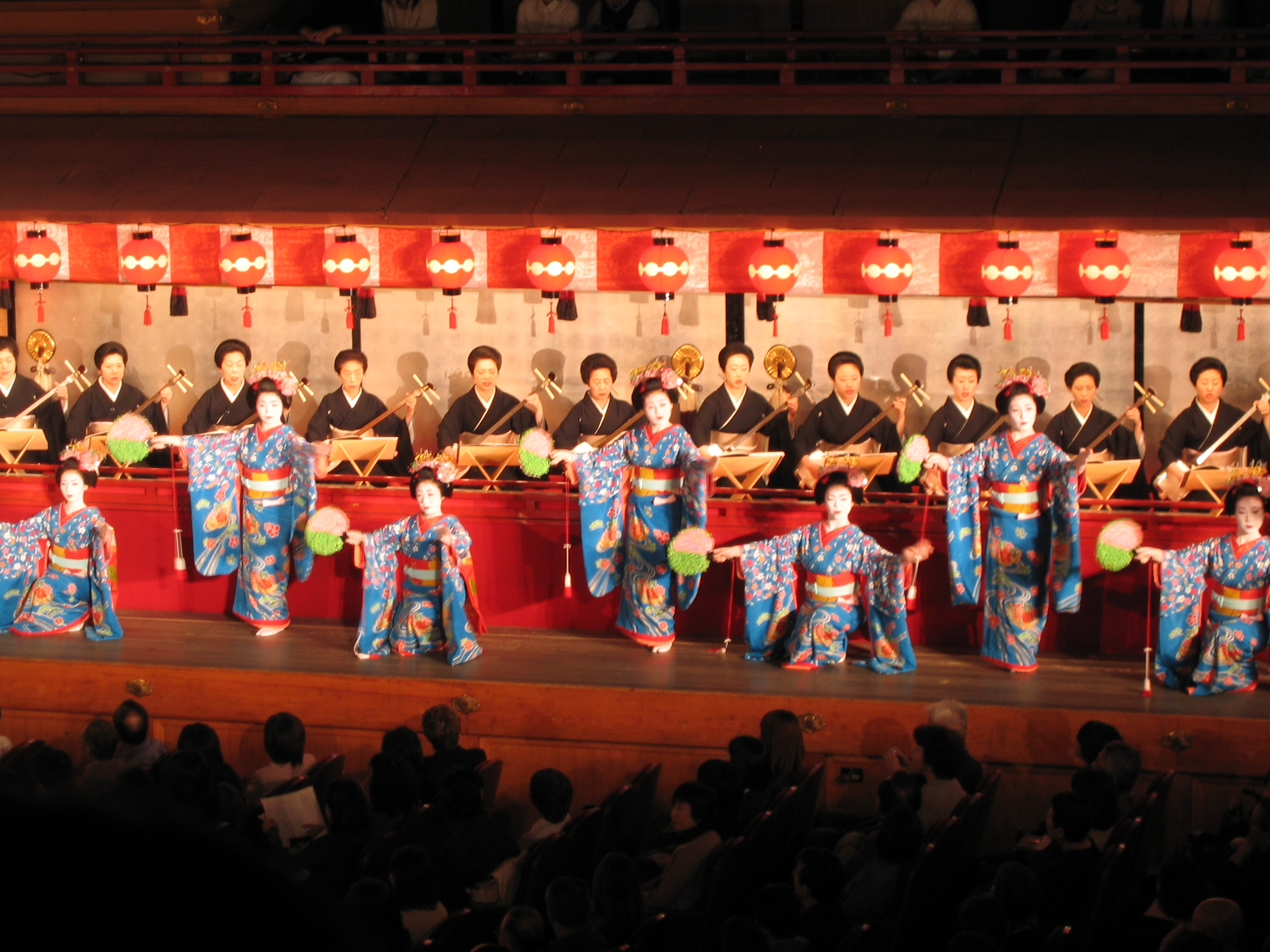 Miyako Odori. Geisha Dancing.